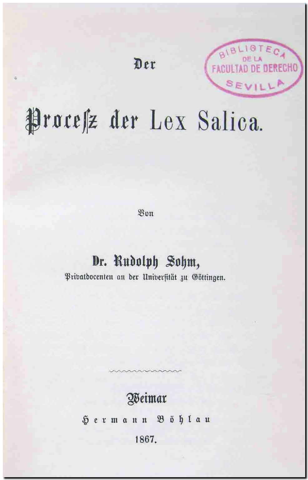 Der Process der Lex Salica